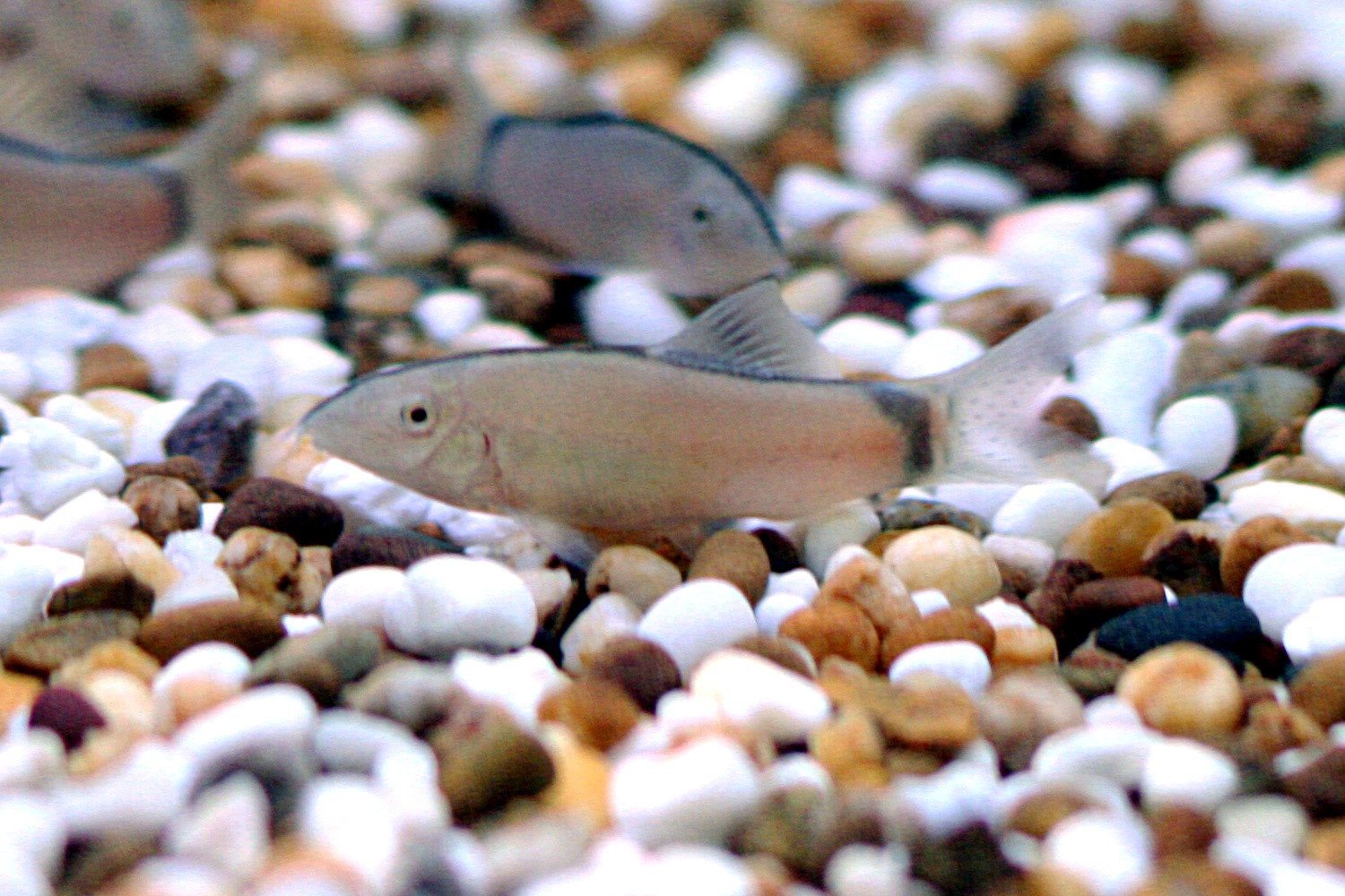 Skunk loach Yasuhikotakia morleti. Size about 5cm SL.